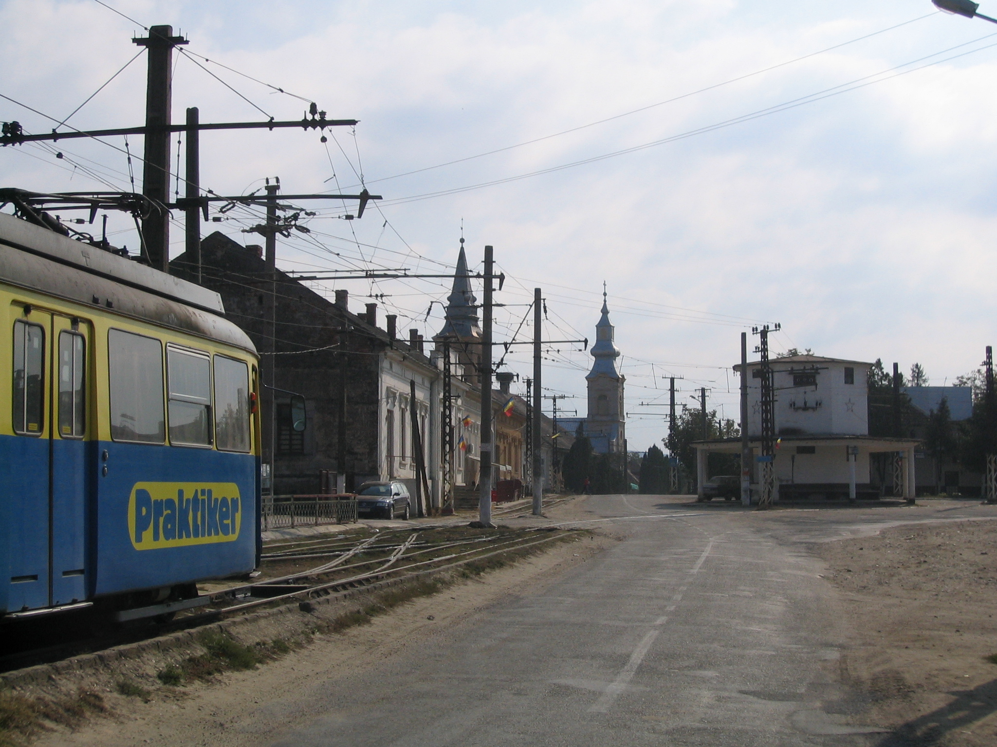 Capatul liniei de tramvai Arad-Ghioroc